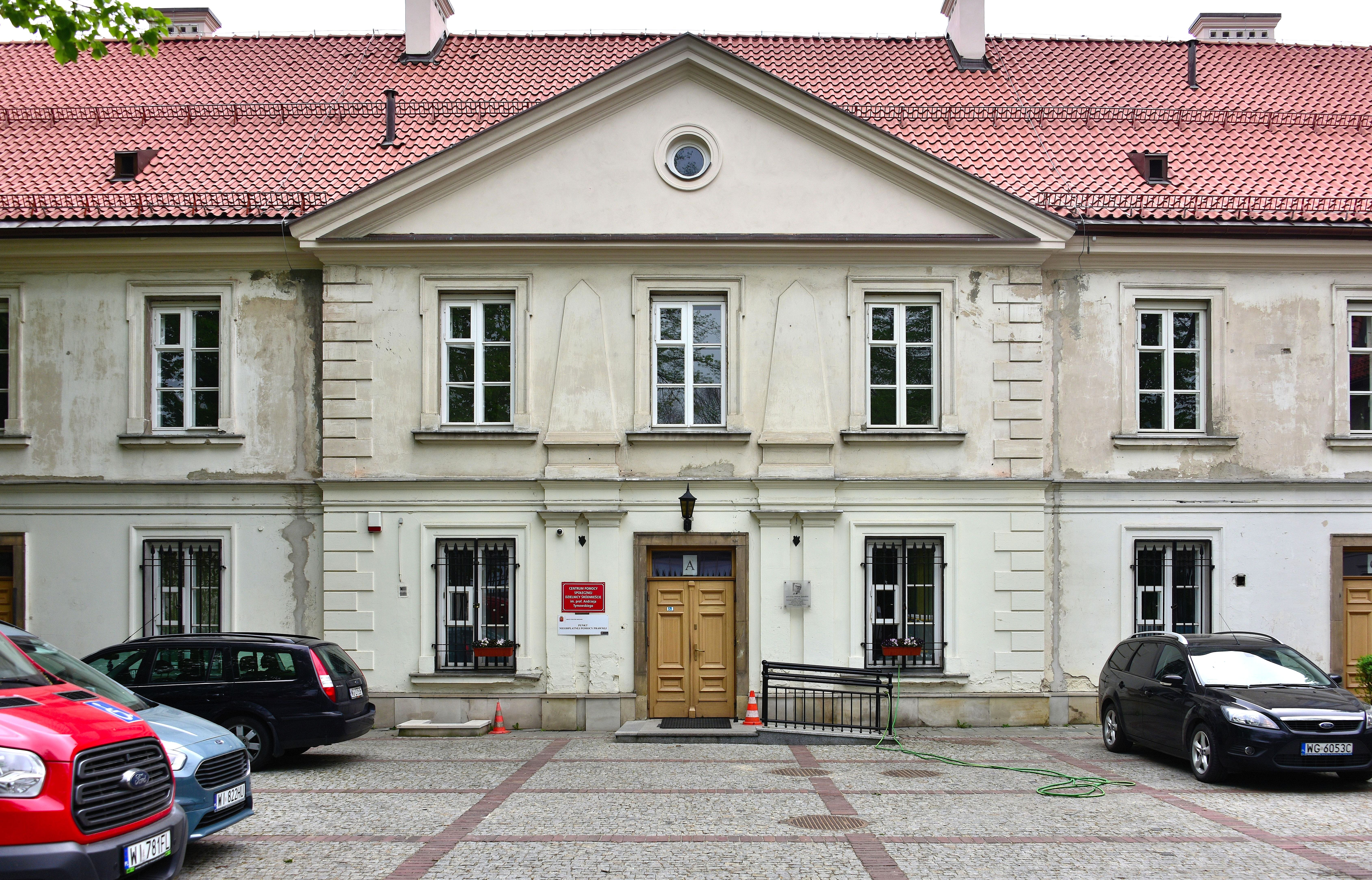 Pałac Sierakowskiego przy ul. Konwiktorskiej 3/5 w Warszawie